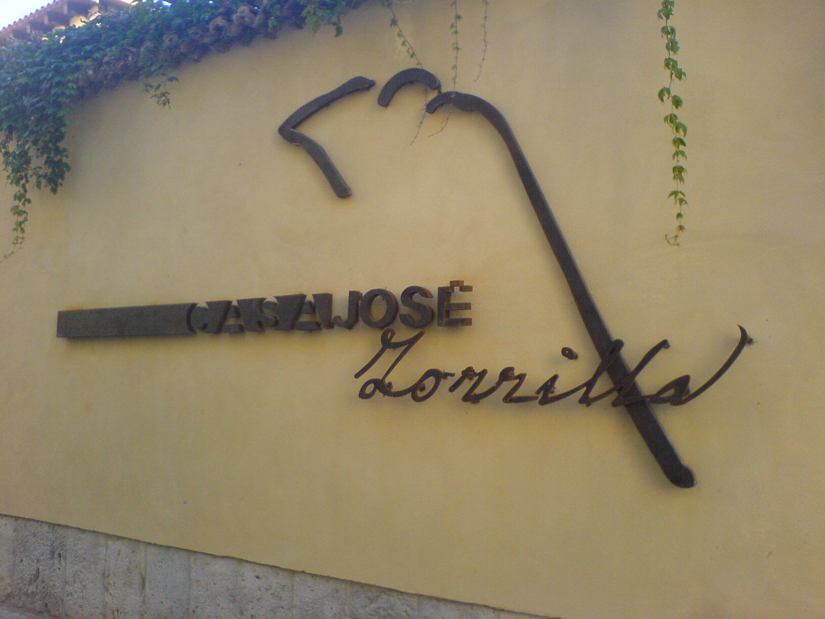 Entrada a la Casa Museo de Jose Zorrilla en Valladolid